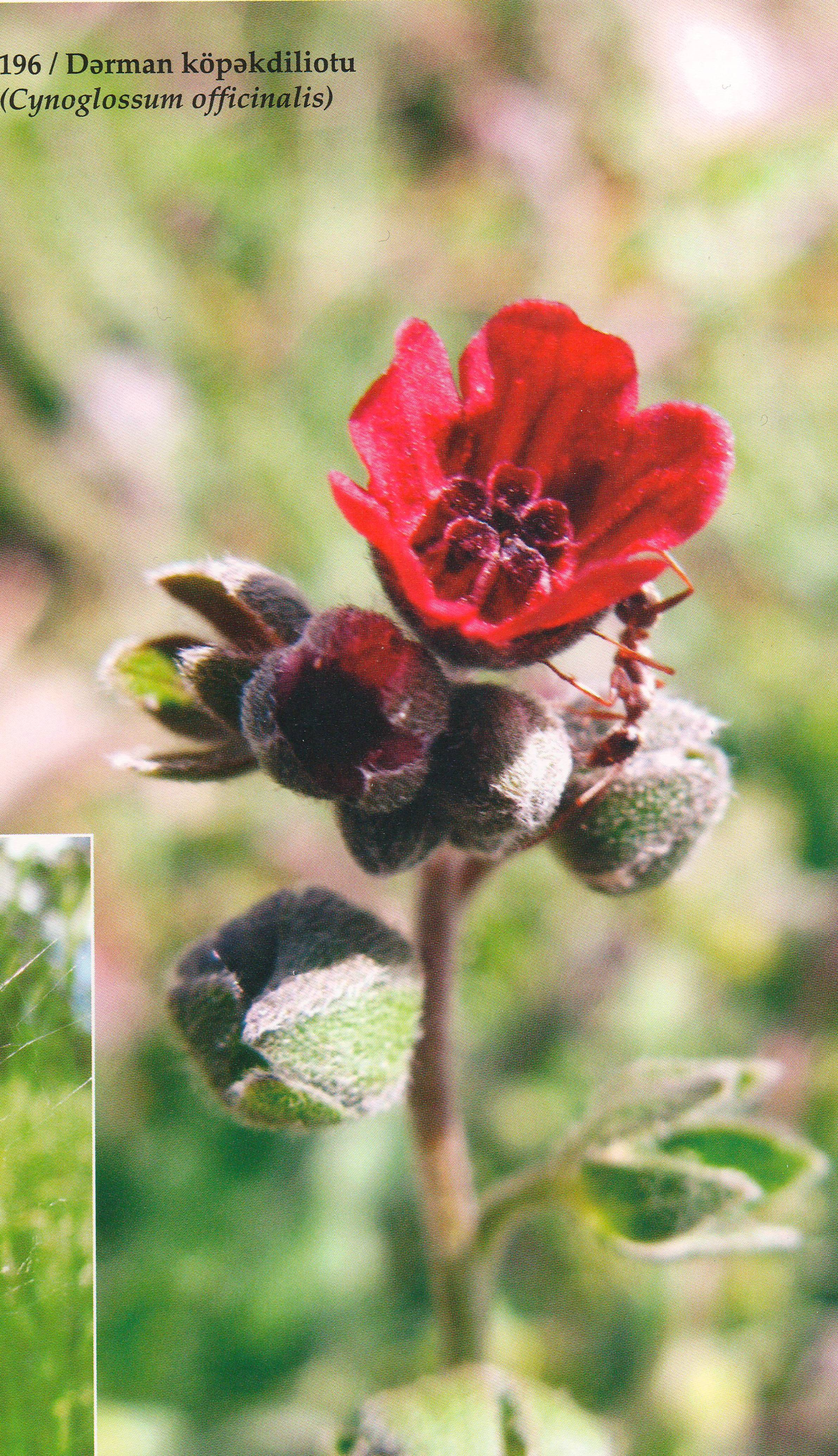 Imişli Dərman köpəkdilotu